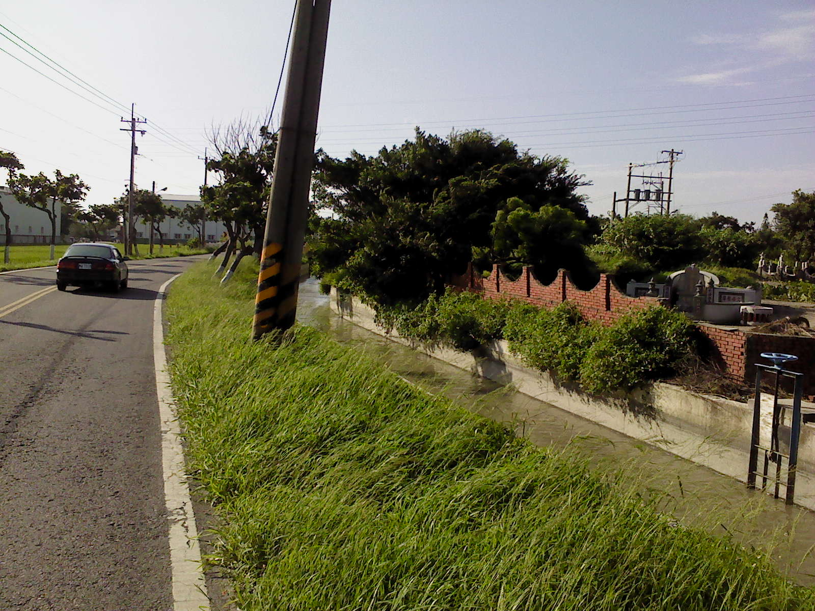 線西鄉中興路旁的「青青河畔草」 (120531)